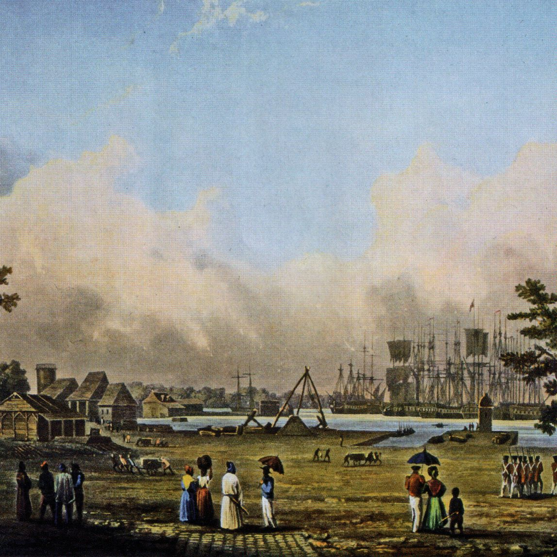 Port-Louis, extrait du "Voyage autour du monde" de Cyrille Pierre Théodore Laplace